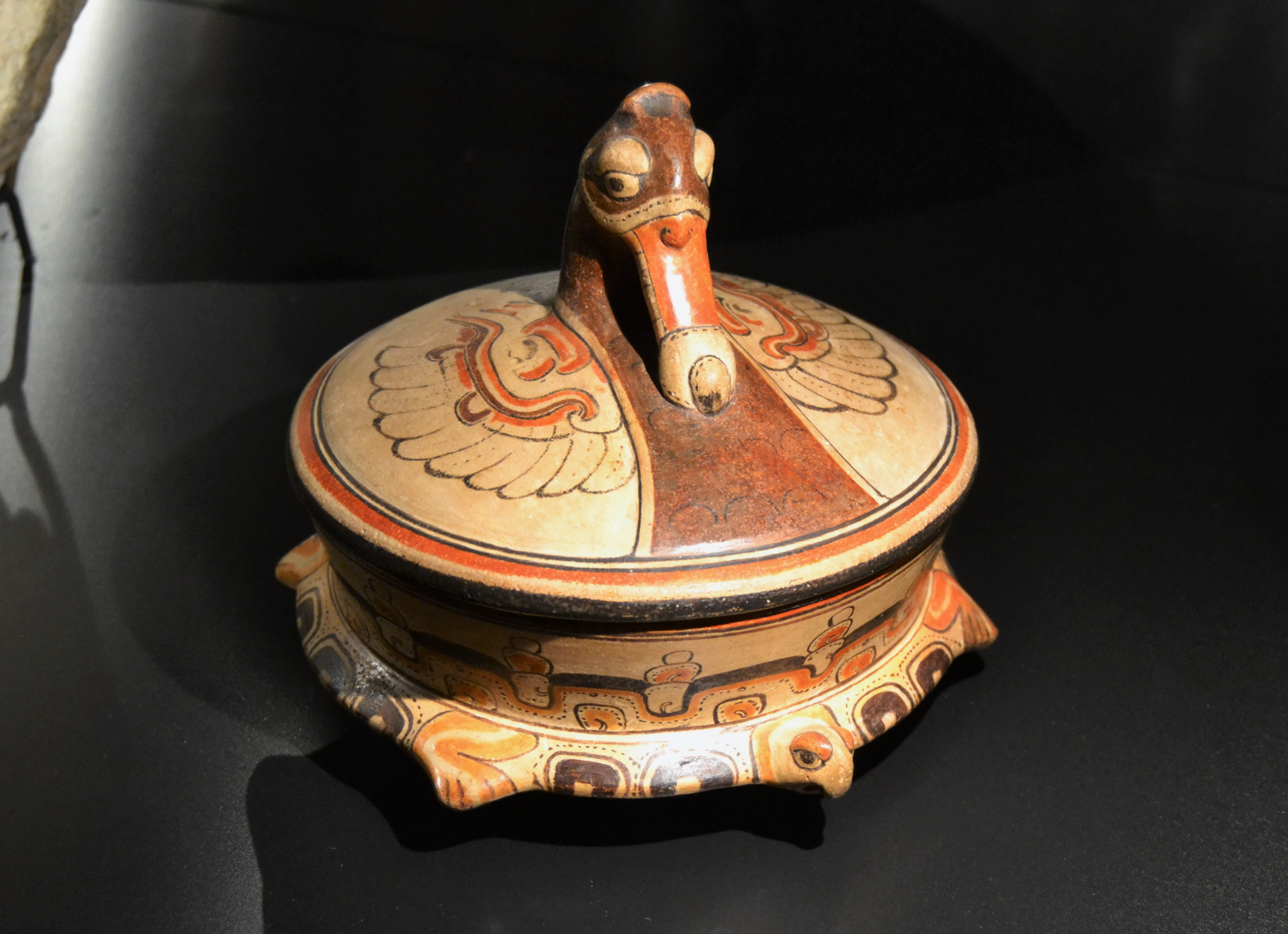 Recipient amb tapa i agafador amb forma de cormorà. Tikal. Període clàssic primerenc (250-600), ceràmica. Museu Nacional d'Arqueologia i Etnologia de Guatemala (MUNAE). Exposició Maies. L'enigma de les Ciutats Perdudes del museu arqueològic d'Alacant.L'agafador està modelat com el cap d'un cormorà (Phalacrocorax auritus o Phalacrocorax brasilianus), que a més es pot identificar pel seu plomatge negre, l'alçacoll i la típica punta corbada del seu pic. La part inferior del recipient té una franja pintada que representa l'aigua, que cobreix una tortuga el cap i les extremitats de la qual formen la vora del recipient.